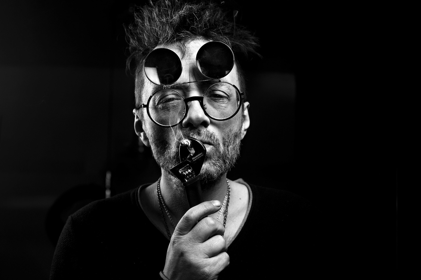 Фото с концерта "The Matrixx" в Санкт-Петербурге (16.03.2018)